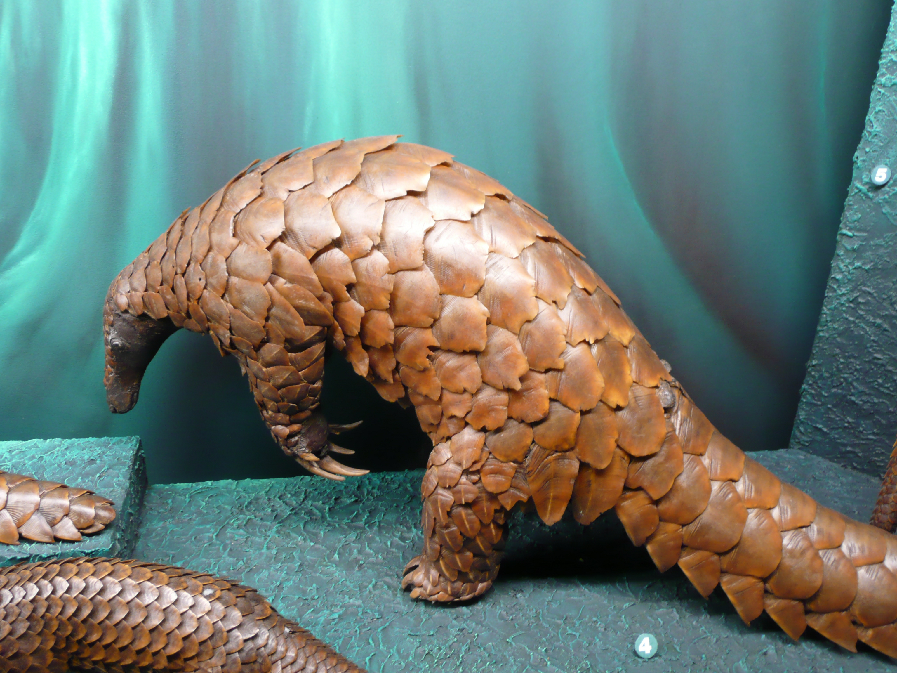 Stuffed Smutsia gigantea in Muséum d'histoire naturelle de Genève Map: 46° 11' 56" N 6° 9' 30" E